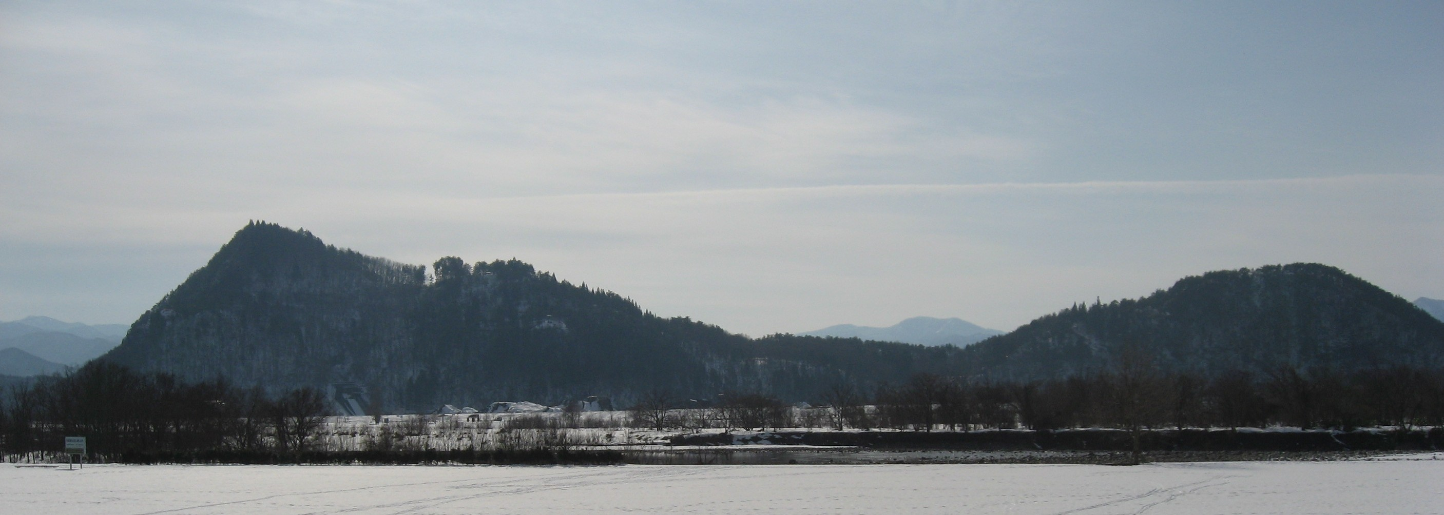 Mukaihaguro-yamasiroato Mukaihaguroyama Castle, Aizumisato, Fukushima Prefecture, Japan